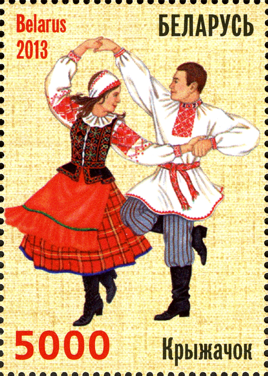 Совместный выпуск Беларуси и Азербайджана. Народные танцы